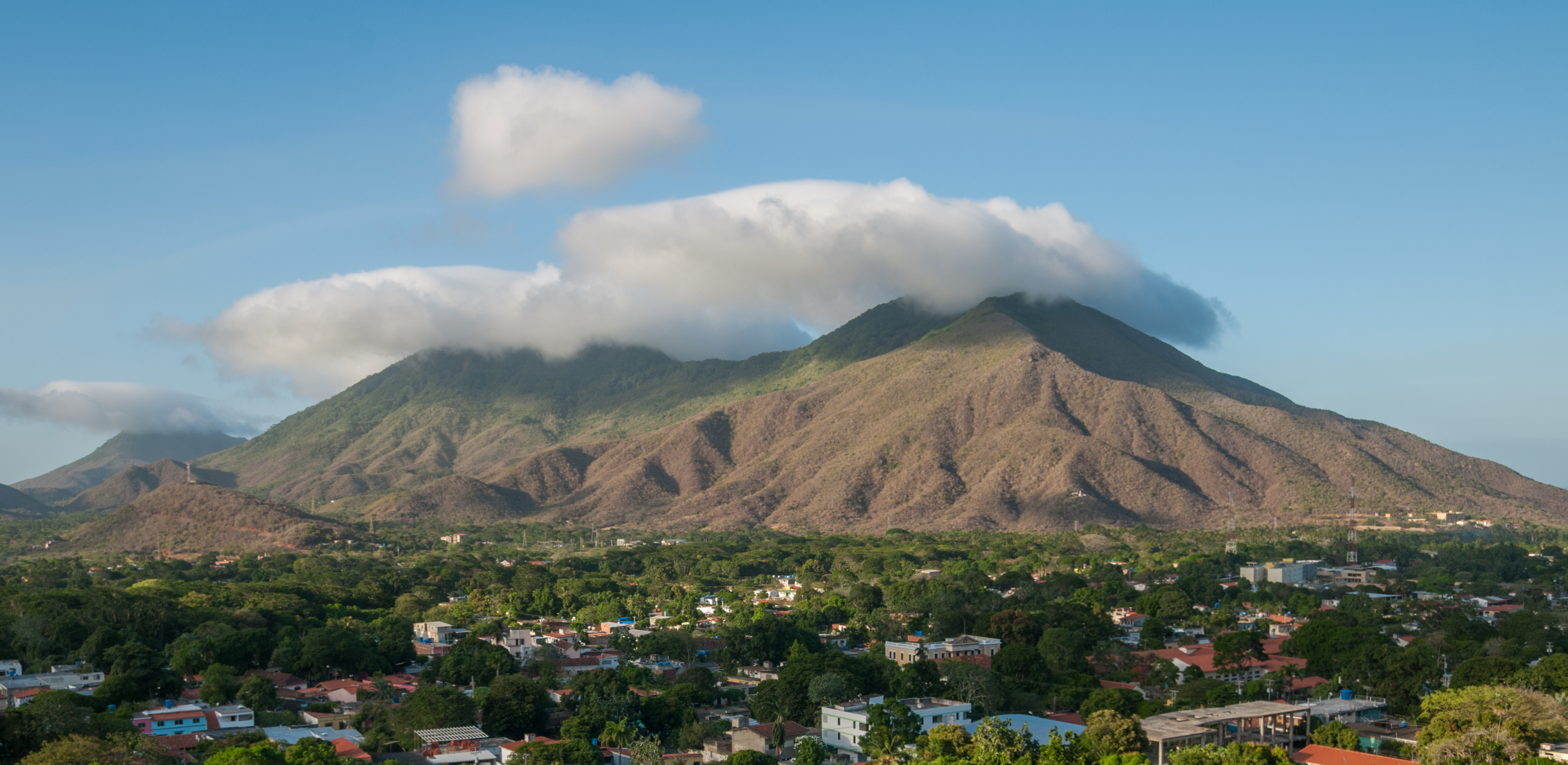 Panorámica de la población de La Asunción